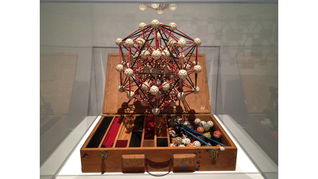 Так выглядели первые модели ZOMETOOl